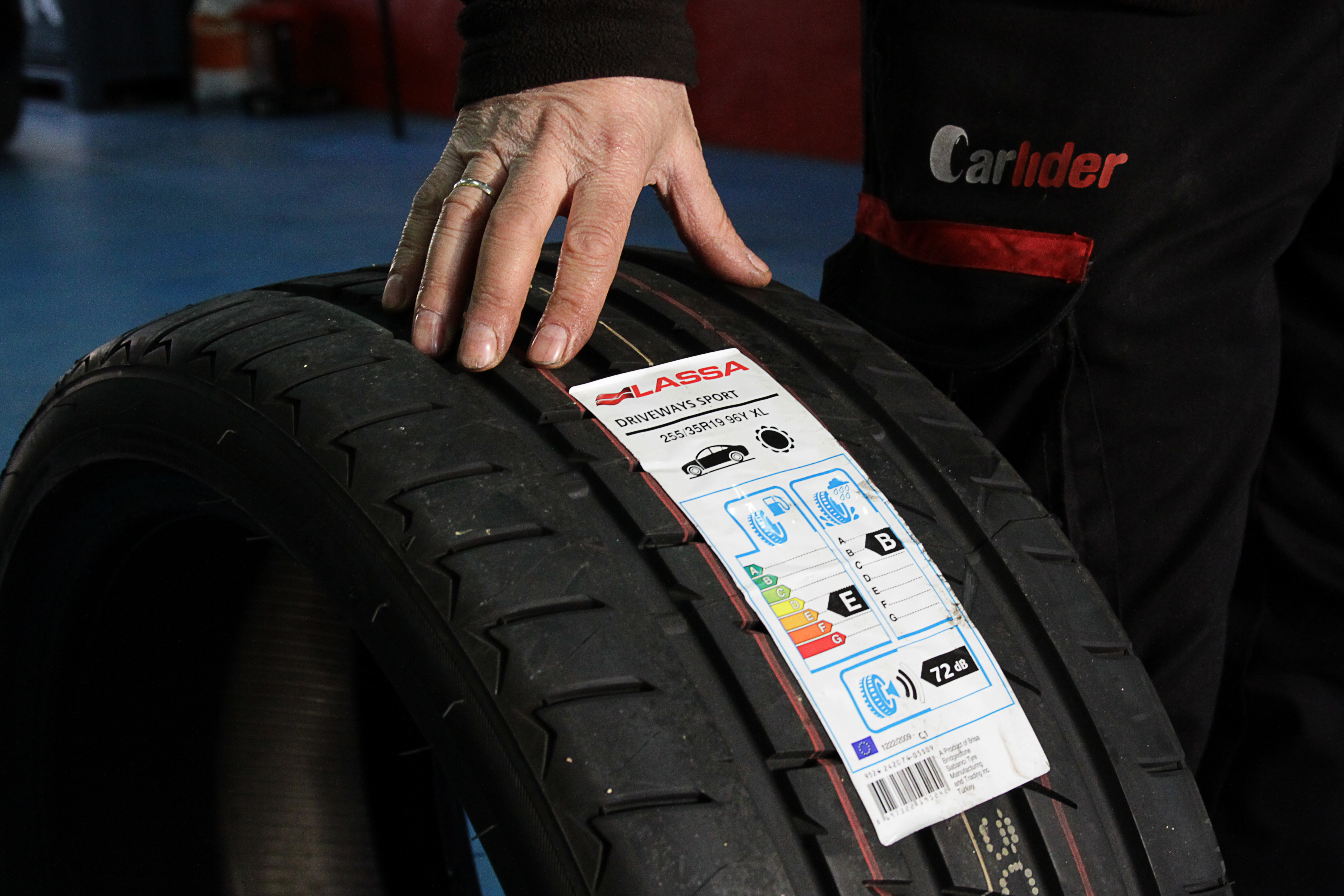 Detalle Etiqueta Europea en Neumático